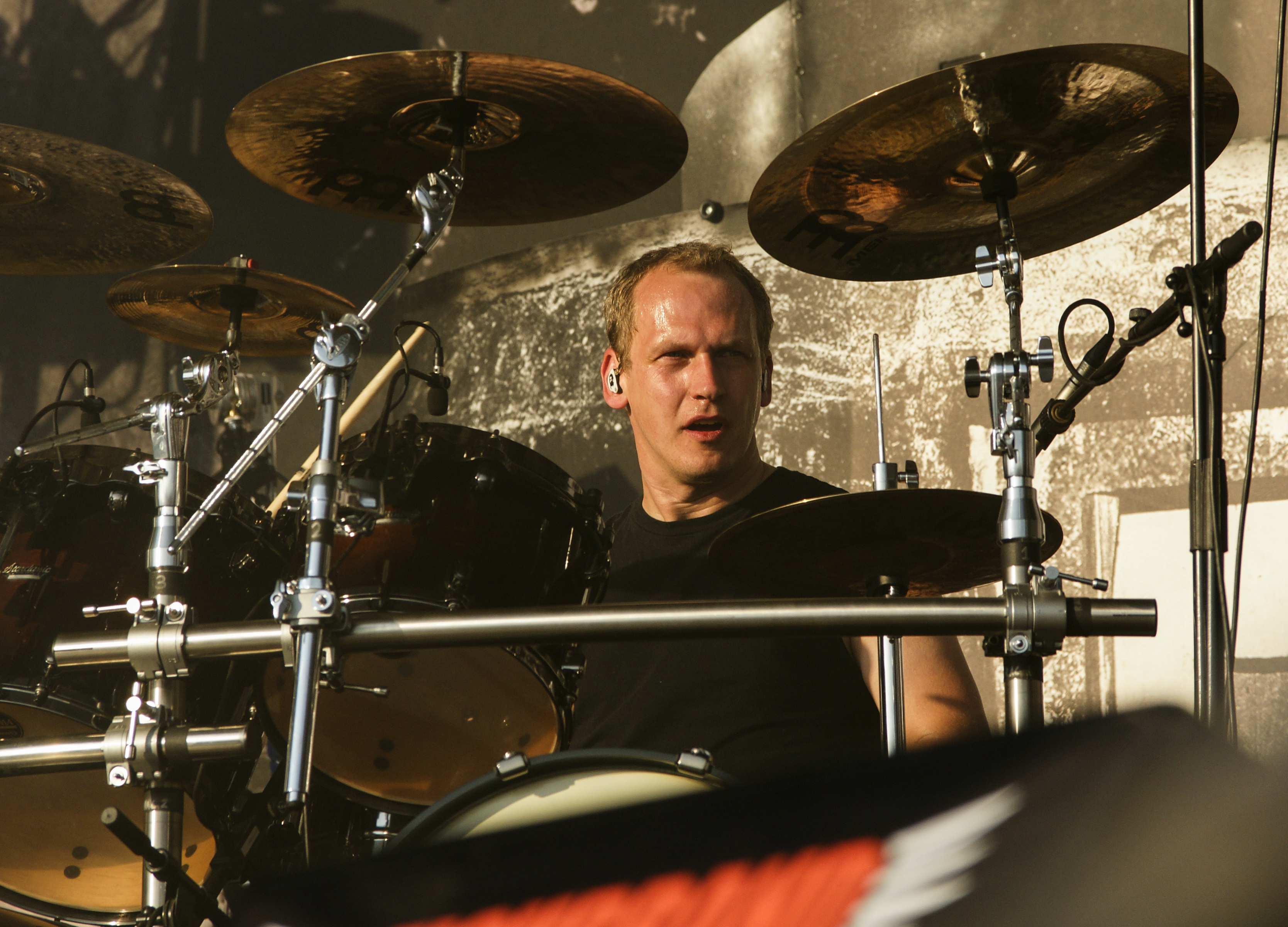 Deichbrand-Festival Seeflughafen Nordholz/ Cuxhaven Heaven Shall Burn auf der Fire-Stage